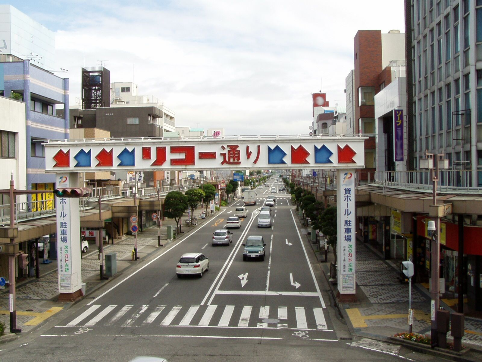 "RICOH Street" in 〒410-0056 Shizuoka-ken, Numazu-shi, Takashimachō, 3−３